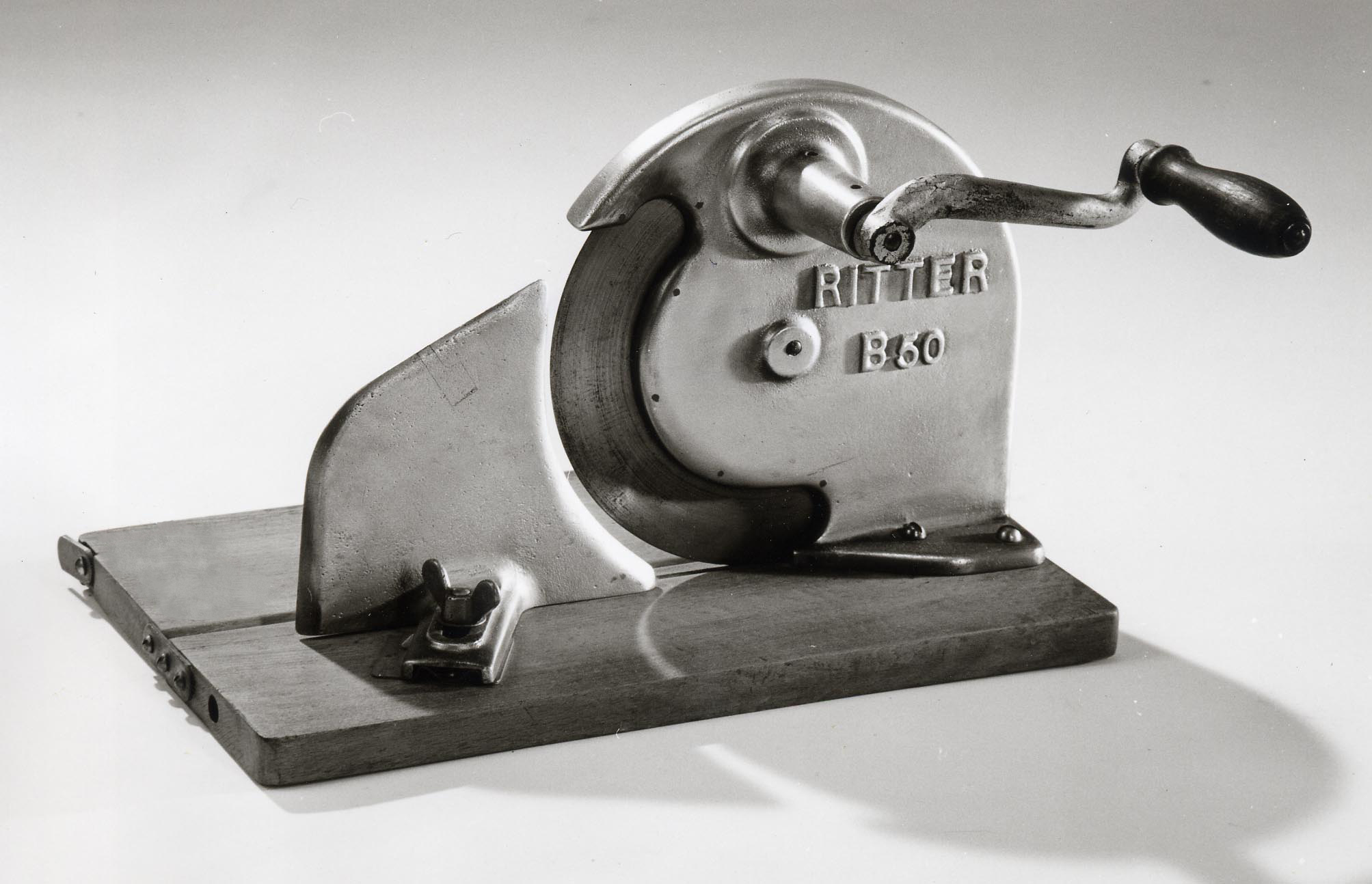 Erster Allesschneider von Ritter & Sohn